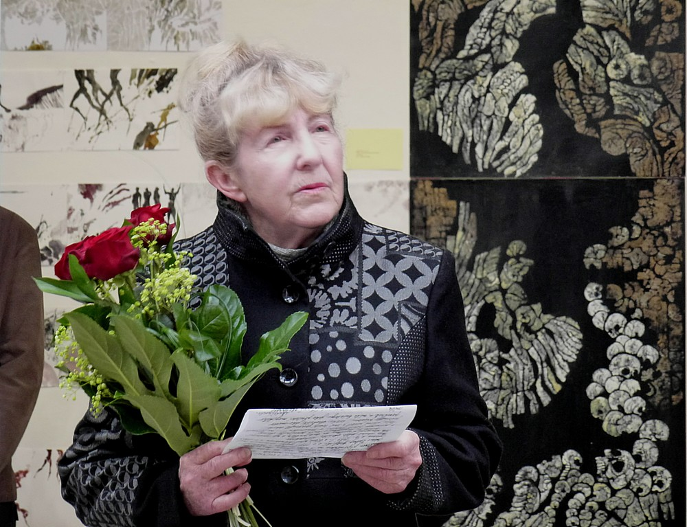 Jiřina Adamcová - Výstava Terezín 2012